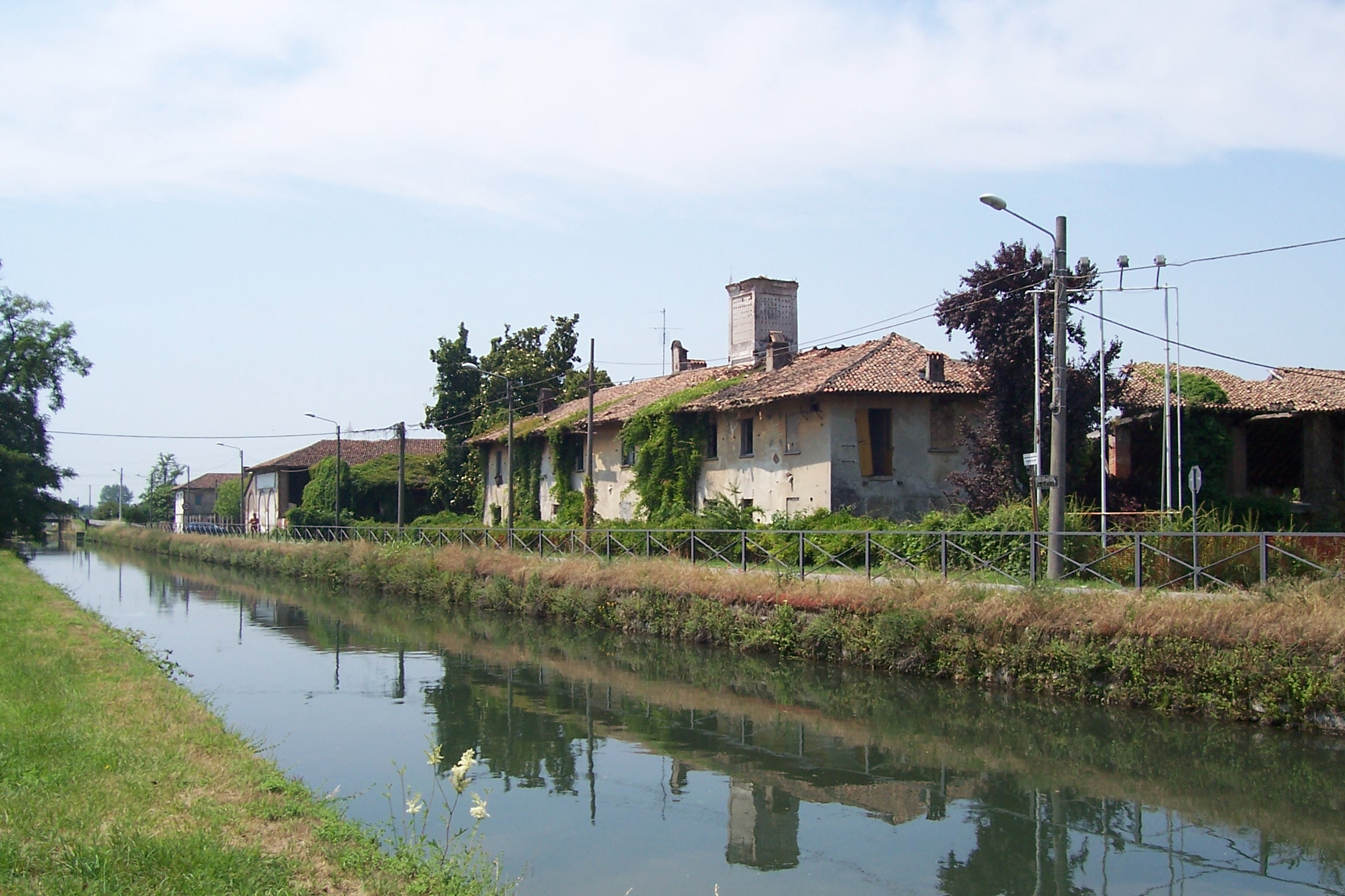 Cascina Moirago sul Naviglio Pavese, a Zibido San Giacomo